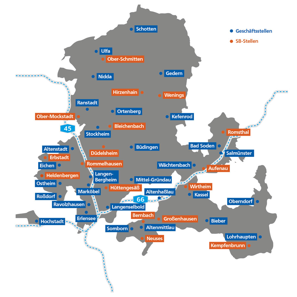 Geschäftssgebiet der VR Bank Main-Kinzig-Büdingen eG